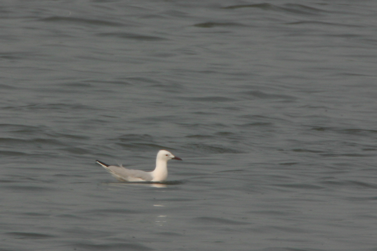 Dunbekmeeuw Larus genei in Zeeuws-Vlaanderen, 6 mei 2006. Foto door P.taars.